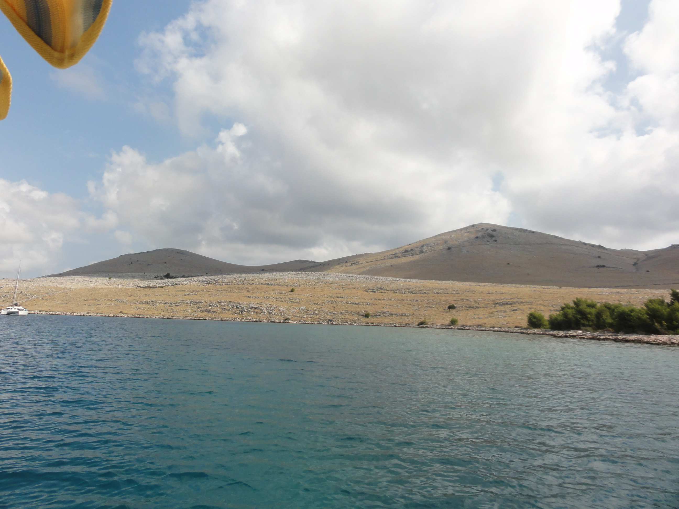 Hrib Metlina je prvi iz desne, fotografiran iz barke, blizu otoka Strižnjak.